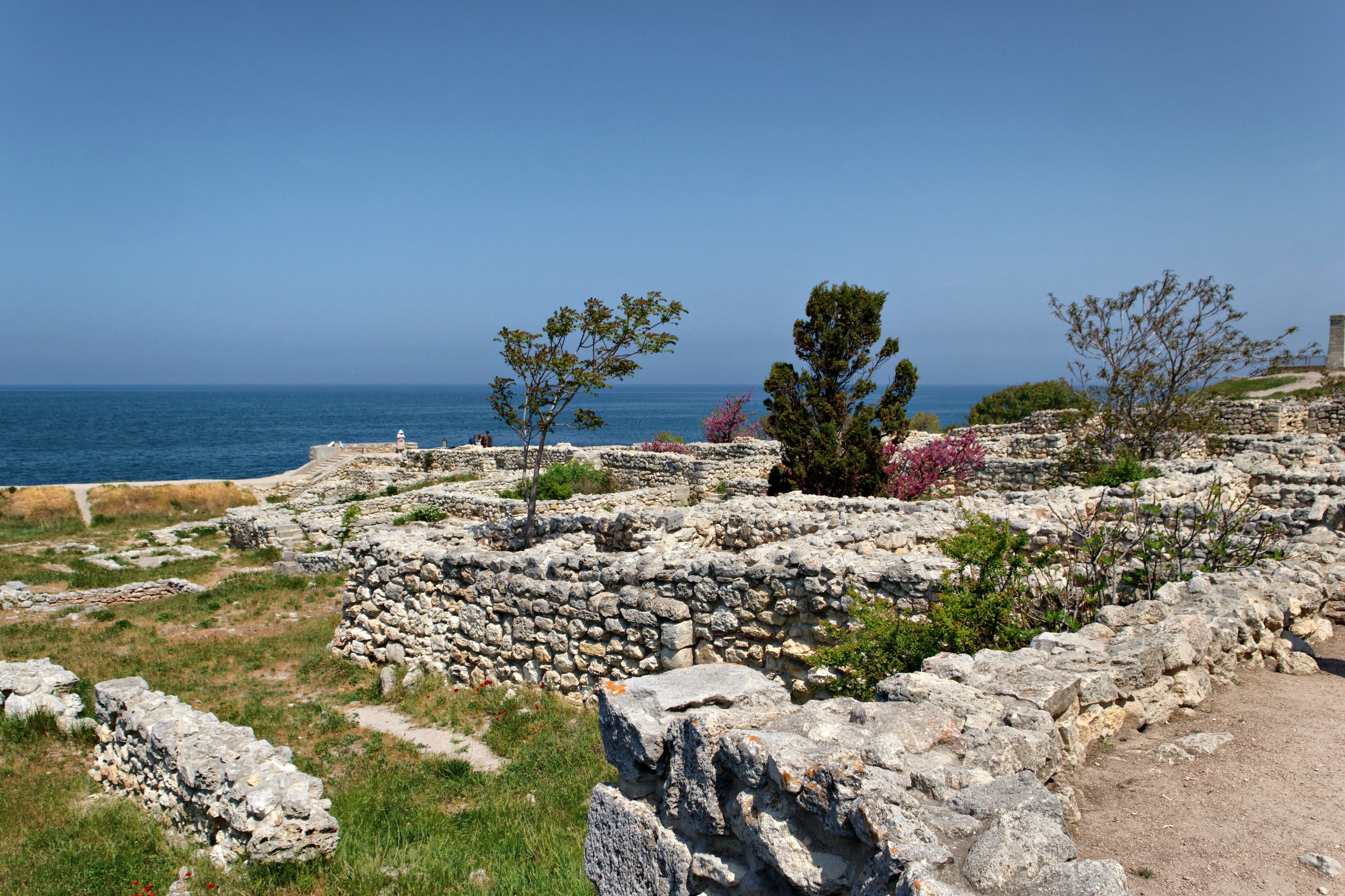 Sevastopol. Chersonesus Севастополь. Херсонес Таврический